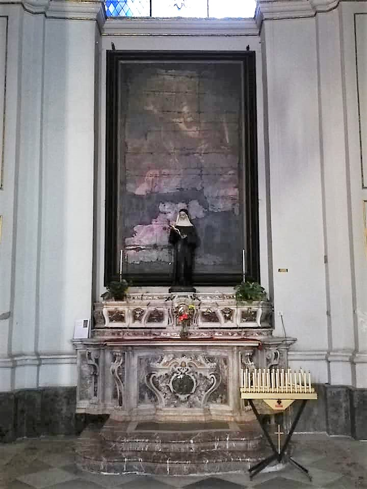 Altare di Sant'Elia Profeta. Dipinto raffigurante Sant'Elia Profeta, opera del 1750 di Olivio Sozzi.